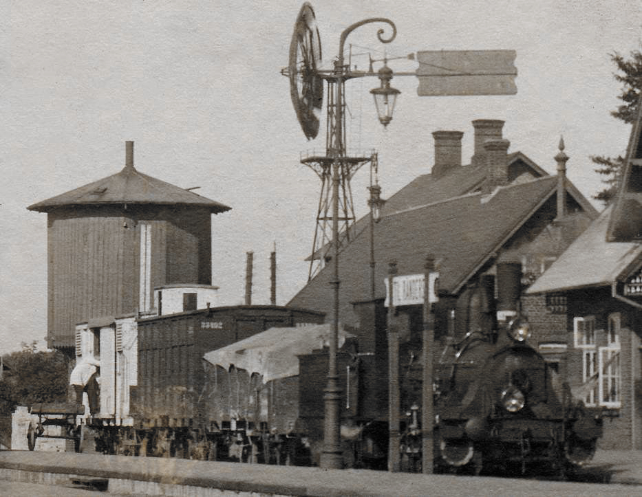 Ryomgard 1913 Litra J 4